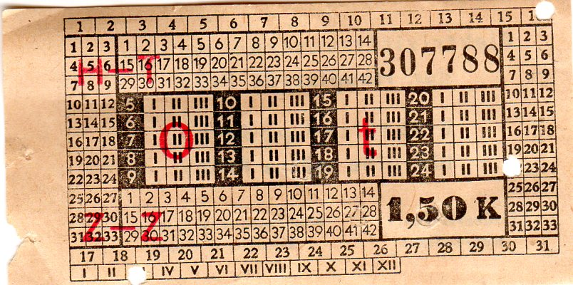 Pražská tramvajová jízdenka, Protektorát, líc